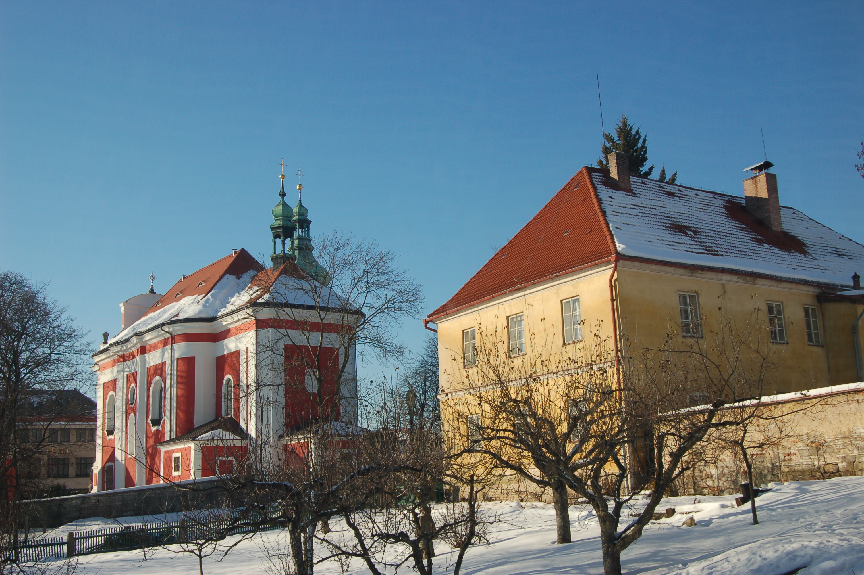 Česky: Kostel sv. Jakuba Většího v Červ. Kostelci